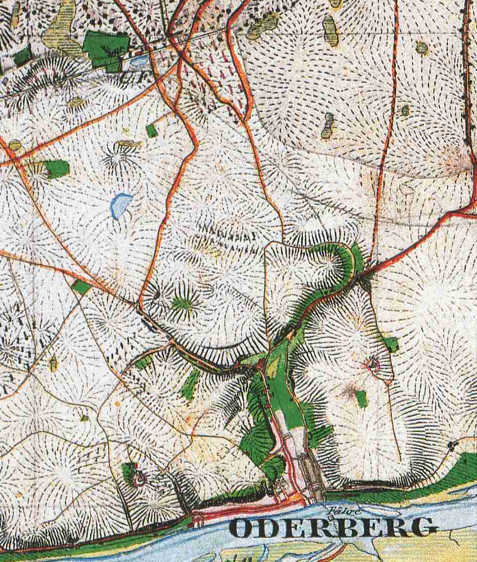 Oderberg mit dem Wohnplatz Maienpfuhl (hier kein Name) der Stadt Oderberg, Lkr. Barnim, Brandenburg, Ausschnitt aus dem Urmesstischblatt 3050 Lunow von 1826